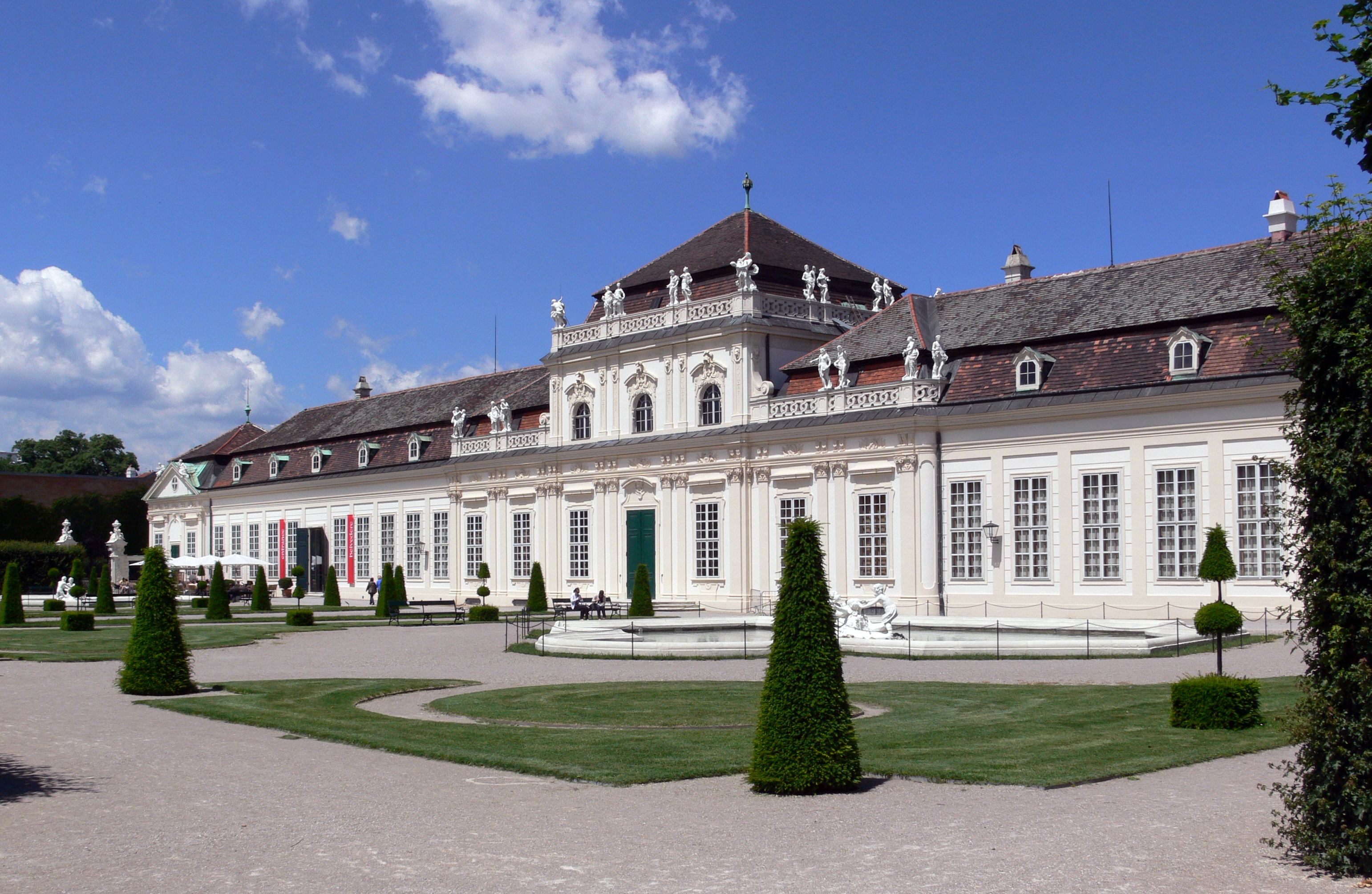 Wien, Unteres Belvedere, Gartenseite